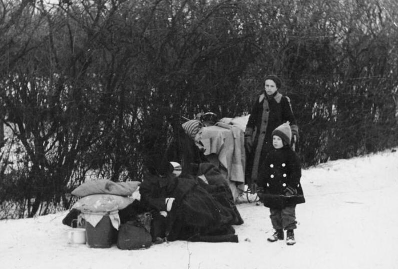 Flüchtlingsfamilie in Oberschlesien Bildberichter: Blaschka Ort: Oberschlesien Datum: Januar 1945 In eisiger Kälte erwartet diese Familie einen Wagen, um mit den anderen Bewohnern ihrer Heimat nach Westen in Sicherheit zu ziehen. [Scherl Bilderdienst]